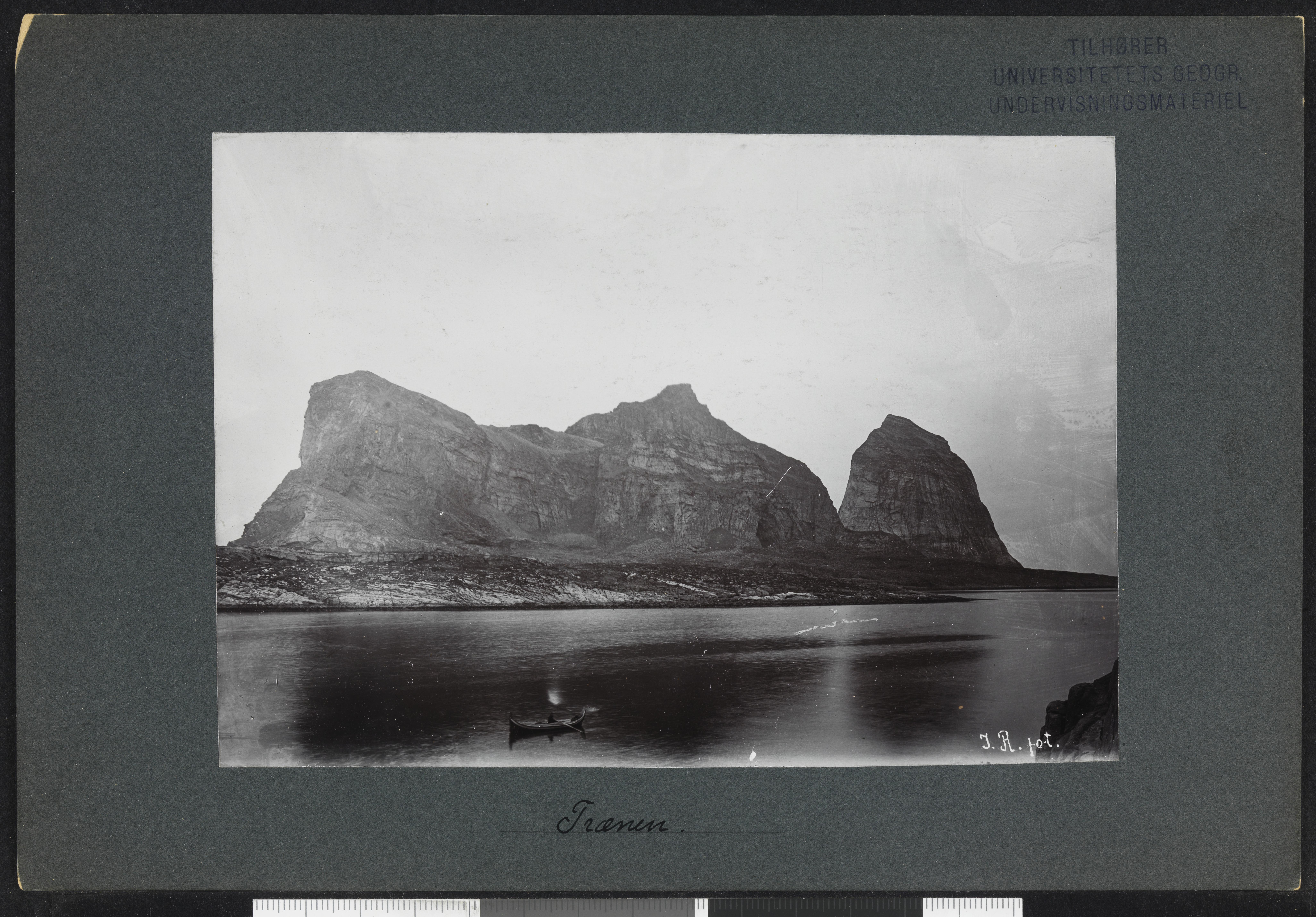 Bildet er hentet fra Nasjonalbibliotekets bildesamling Træna, Nordland